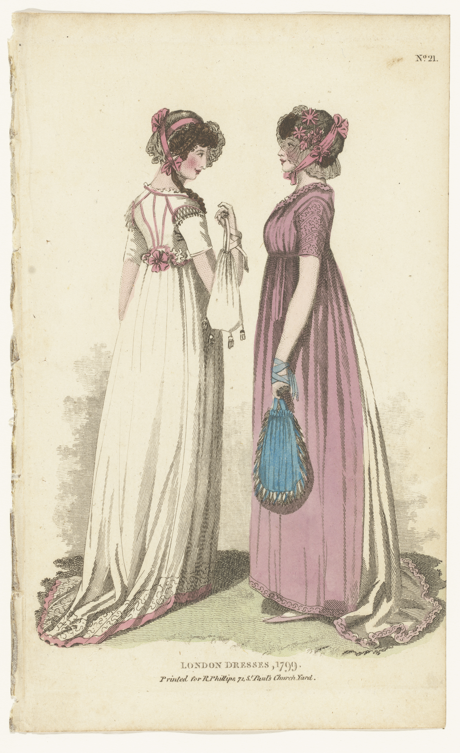 IdentificatieTitel(s): Magazine of Female Fashions of London and Paris, No.21. London Dresses, 1799Objecttype: modeprent Objectnummer: RP-P-2016-8-48Opschriften / Merken: ‘London Dresses, 1799’verzamelaarsmerk, verso, gestempeld: Lugt 2228Omschrijving: Twee dames in Londense japonnen van 1799. Beiden hebben een reticule in de hand.VervaardigingVervaardiger: uitgever: Richard Phillips (vermeld op object)Plaats vervaardiging: LondenDatering: 1799Fysieke kenmerken: ets en aquatint, met de hand gekleurdMateriaal: papier drukinkt waterverf Techniek: etsen / aquatint / met de hand kleurenAfmetingen: h 213 mm × b 130 mmOnderwerpWat: fashion platesdress, gown (+ women's clothes)head-gear: hat (+ women's clothes)bag (RETICULE) (+ women's clothes)Wanneer: 1799 - 1799Verwerving en rechtenCredit line: Aankoop uit het Flora Fonds/Rijksmuseum FondsVerwerving: aankoop 20-jan-2016Copyright: Publiek domein